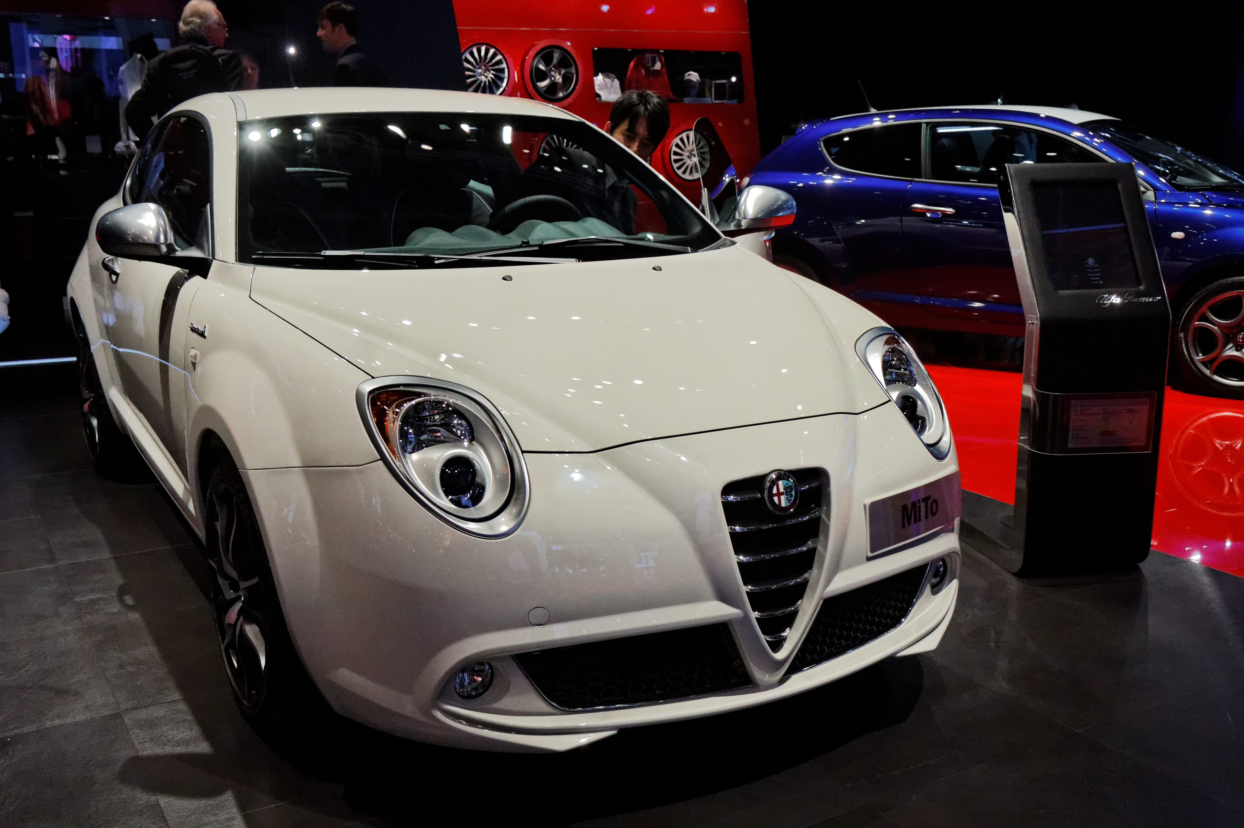 L'Alfa Romeo MiTo présentée lors du Mondial de l'Automobile de Paris 2012.